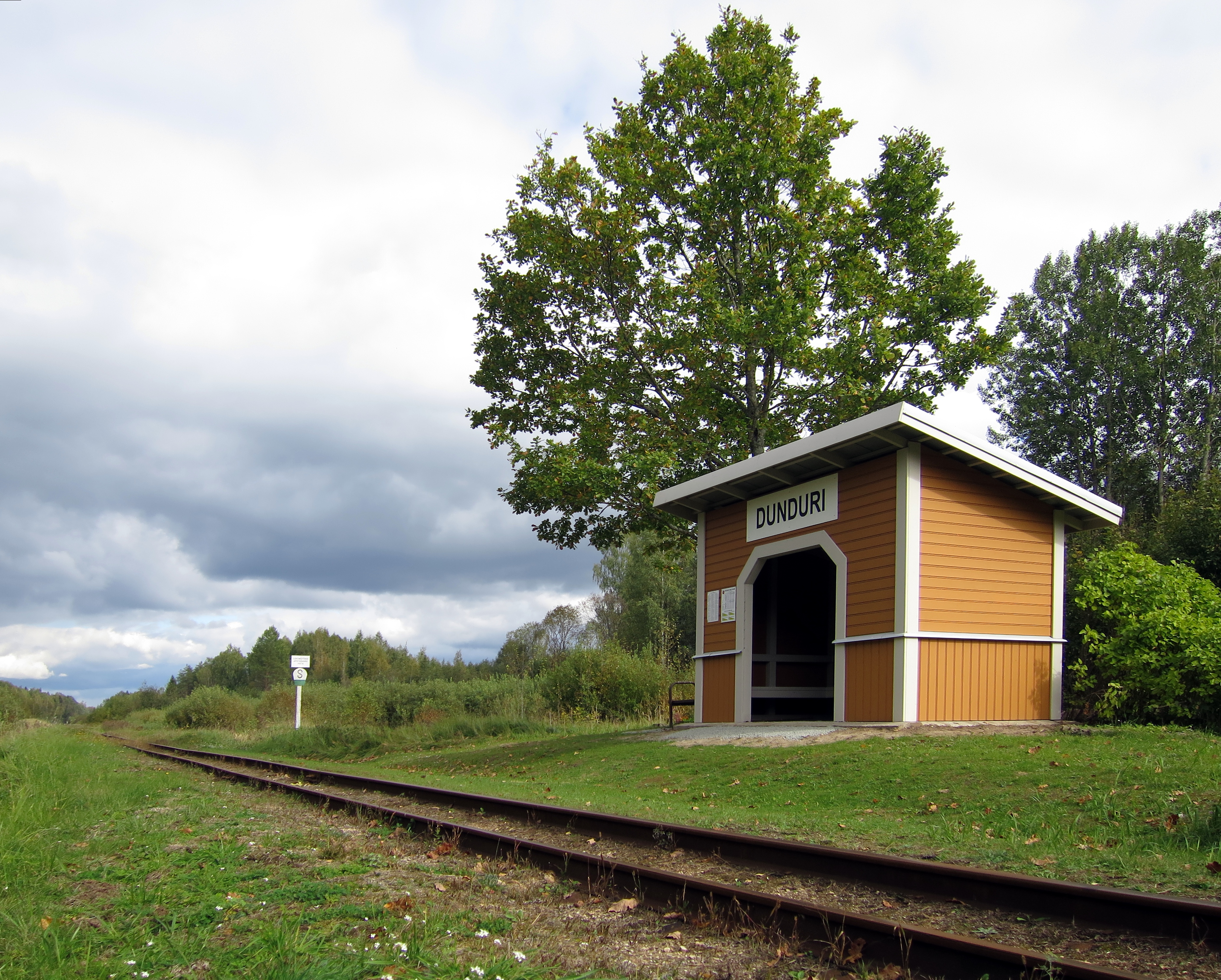 Dunduru stacijas nojume